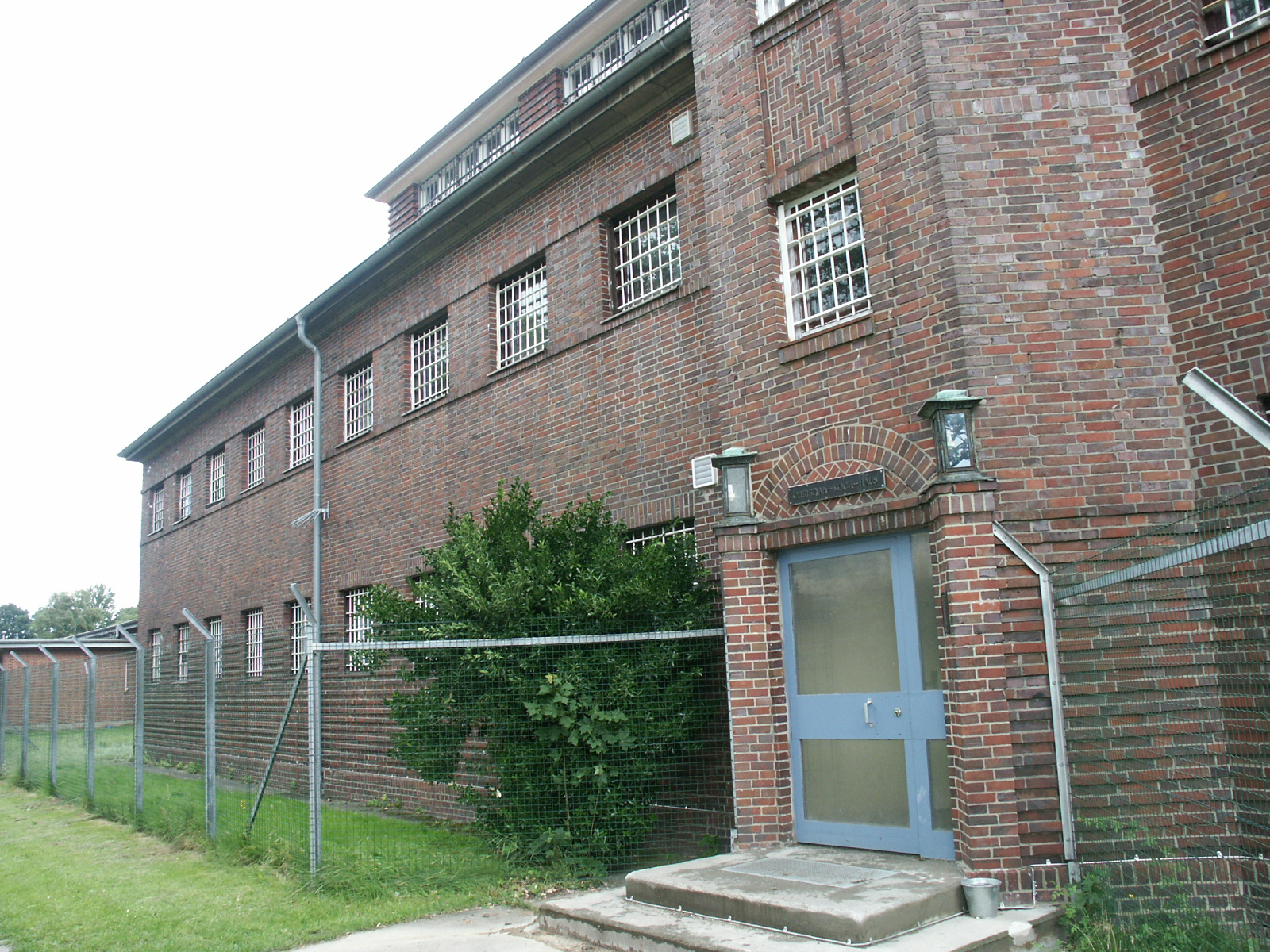 Christian-Koch-Haus (JVA Hahnöfersand), Jugendstrafvollzug in Hamburg